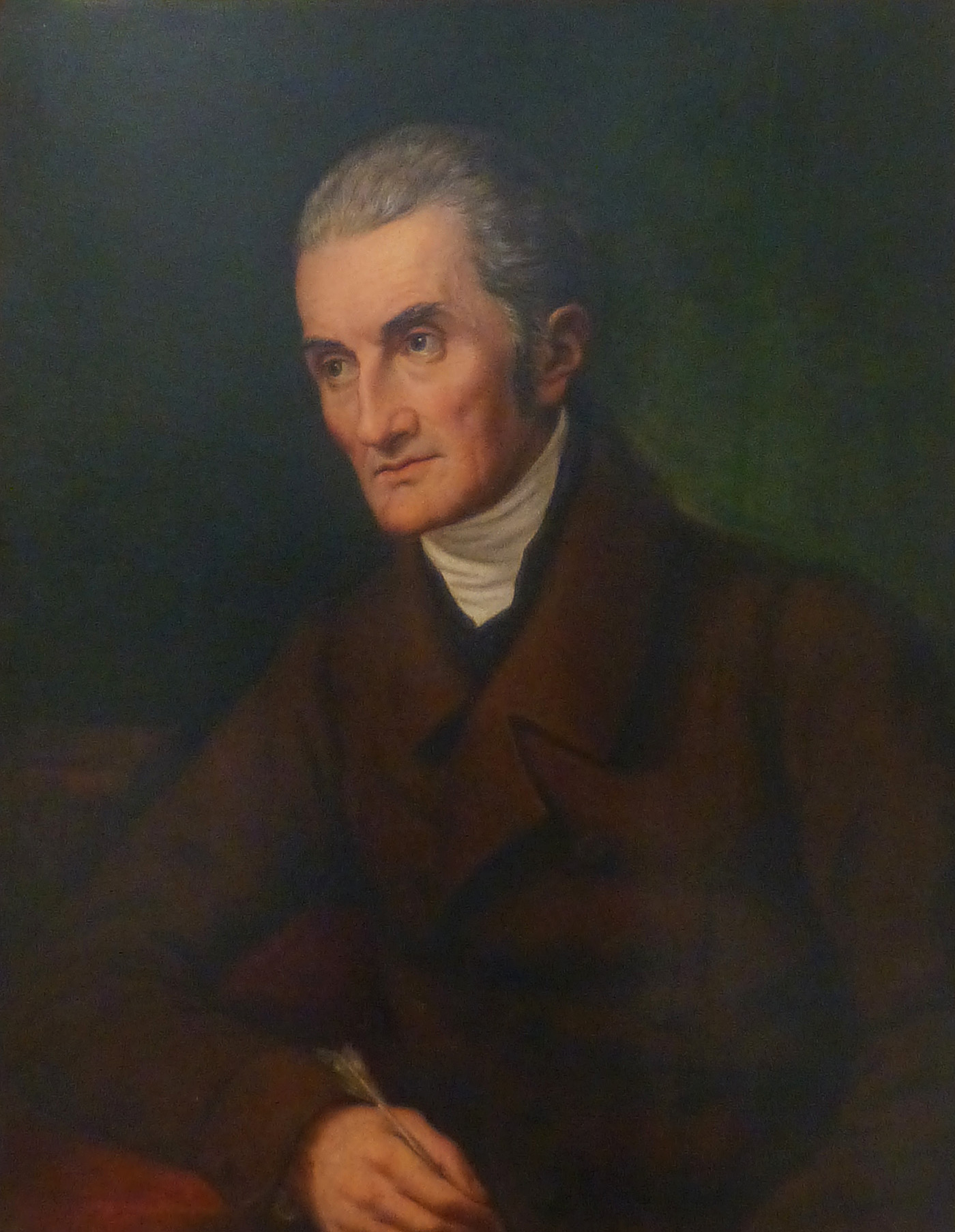 Heinrich Eberhard Gottlob Paulus (1751-1851). Professor für Theologie (Exegese, Kirchengeschichte). Heidelberg, 1811-1844. Maler : Jacob Wilhelm Christian Roux. Universitätsmuseum (Heidelberg).